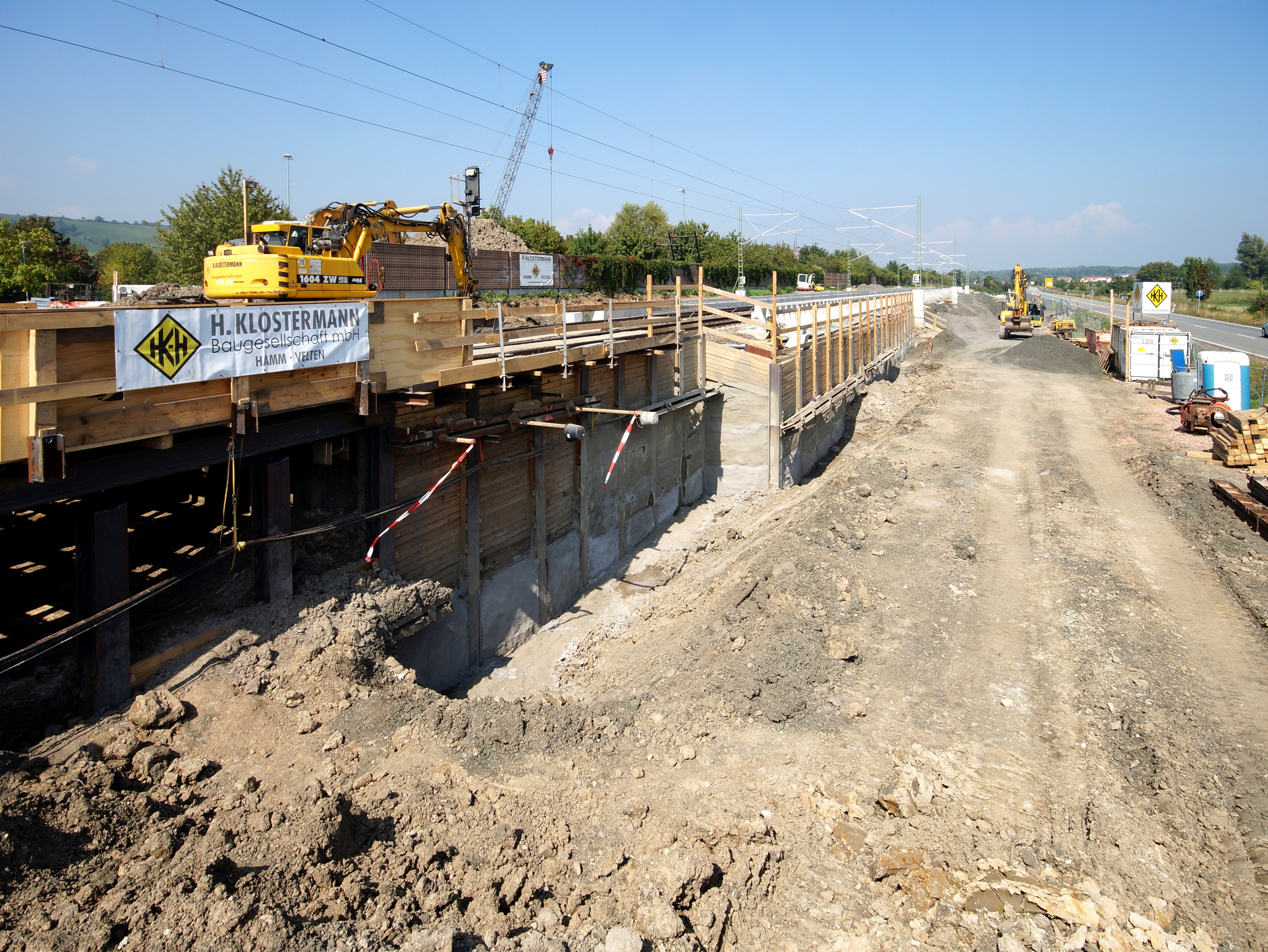 Der Bau des Haltepunkts Dienheim an der Bahnstrecke Mainz–Ludwigshafen im Zuge des Ausbaus der S-Bahn RheinNeckar